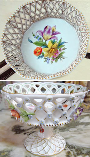 fruteira de porcelana, Manufatura Vieira de Castro, Rio de Janeiro - RJ - Brasil